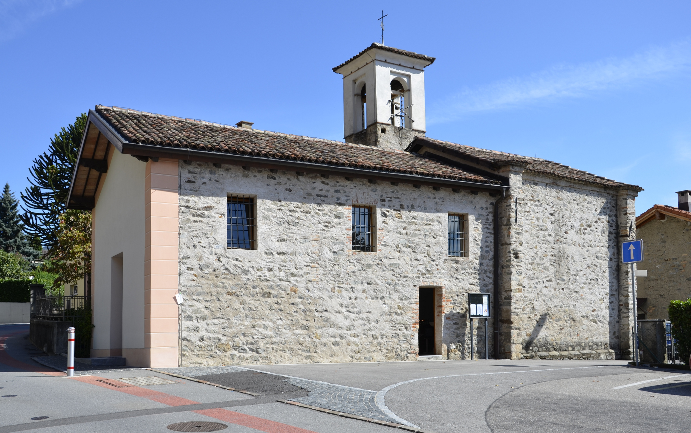 Chiesa di Santa Maria